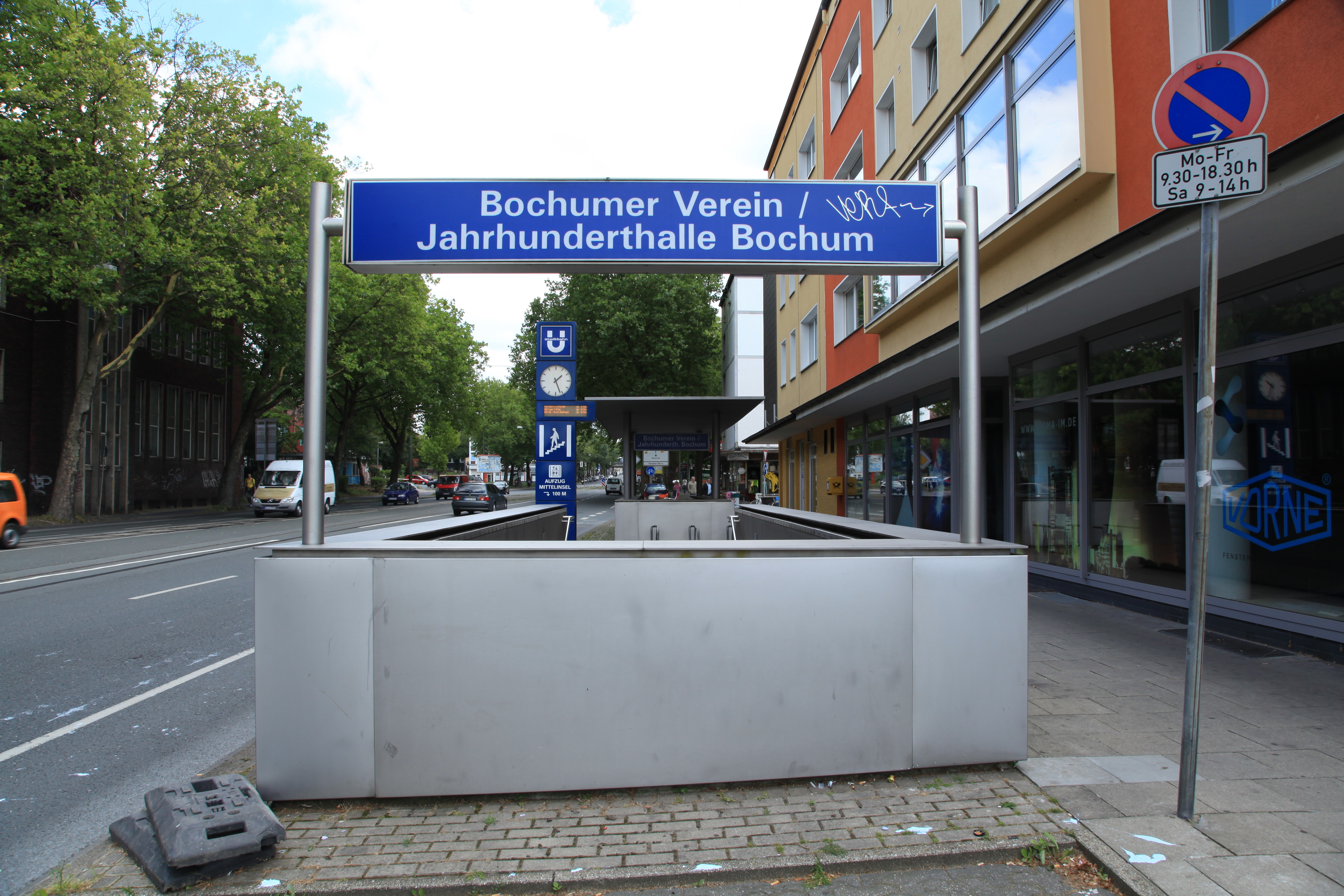 Alleestraße in Bochum